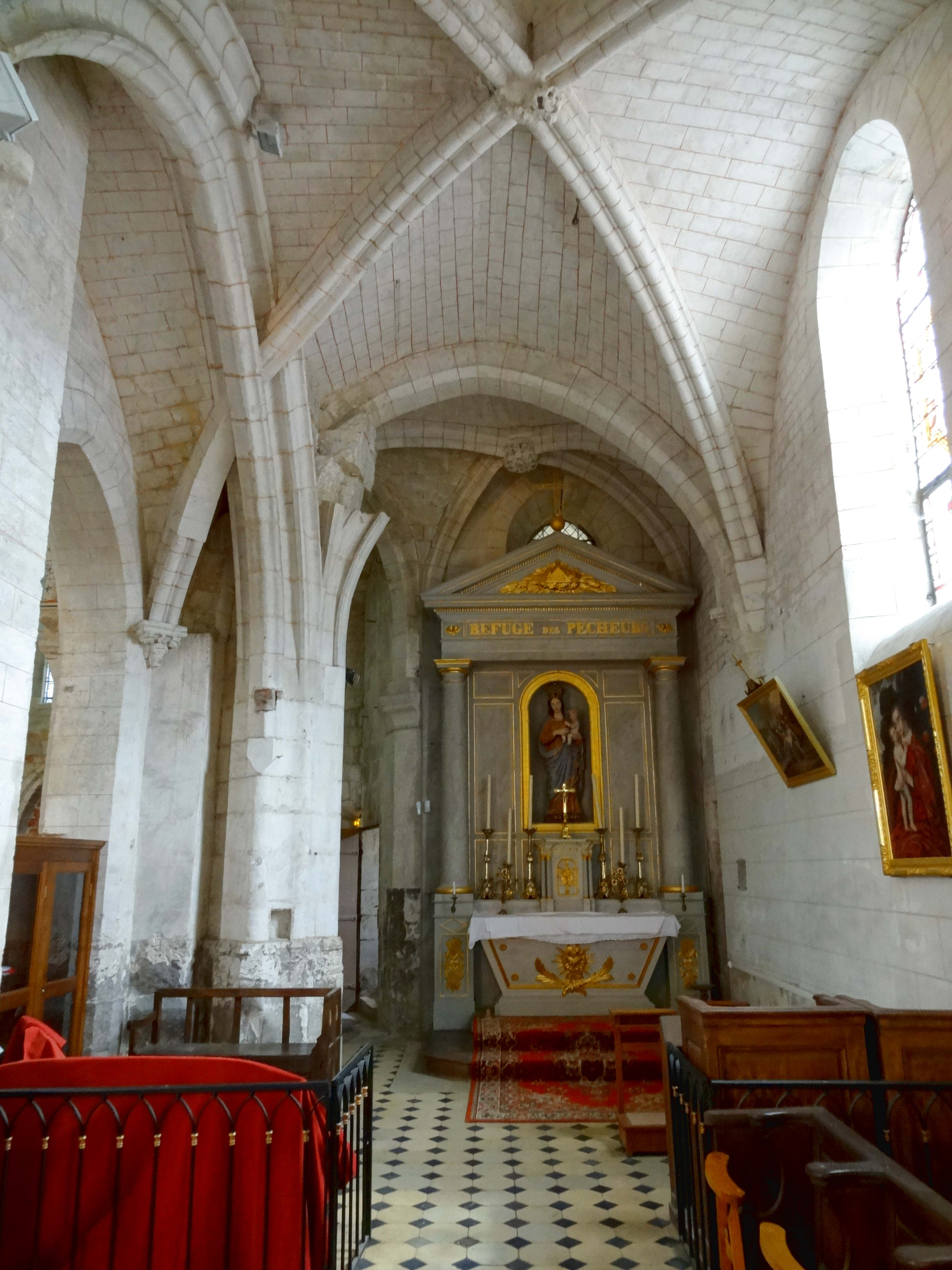 Intérieur de l'église - voir titre.